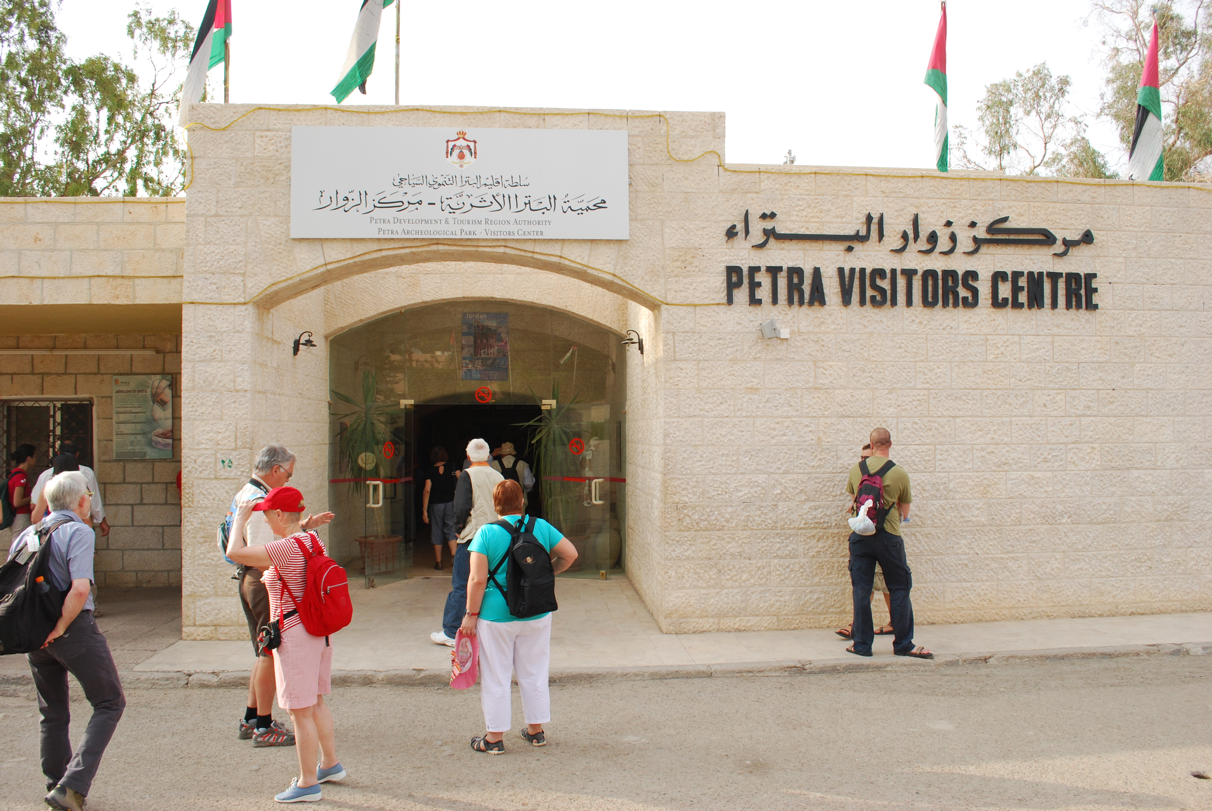 Centre d'accueil touristique à l'entrée du site archéologique de Pétra.